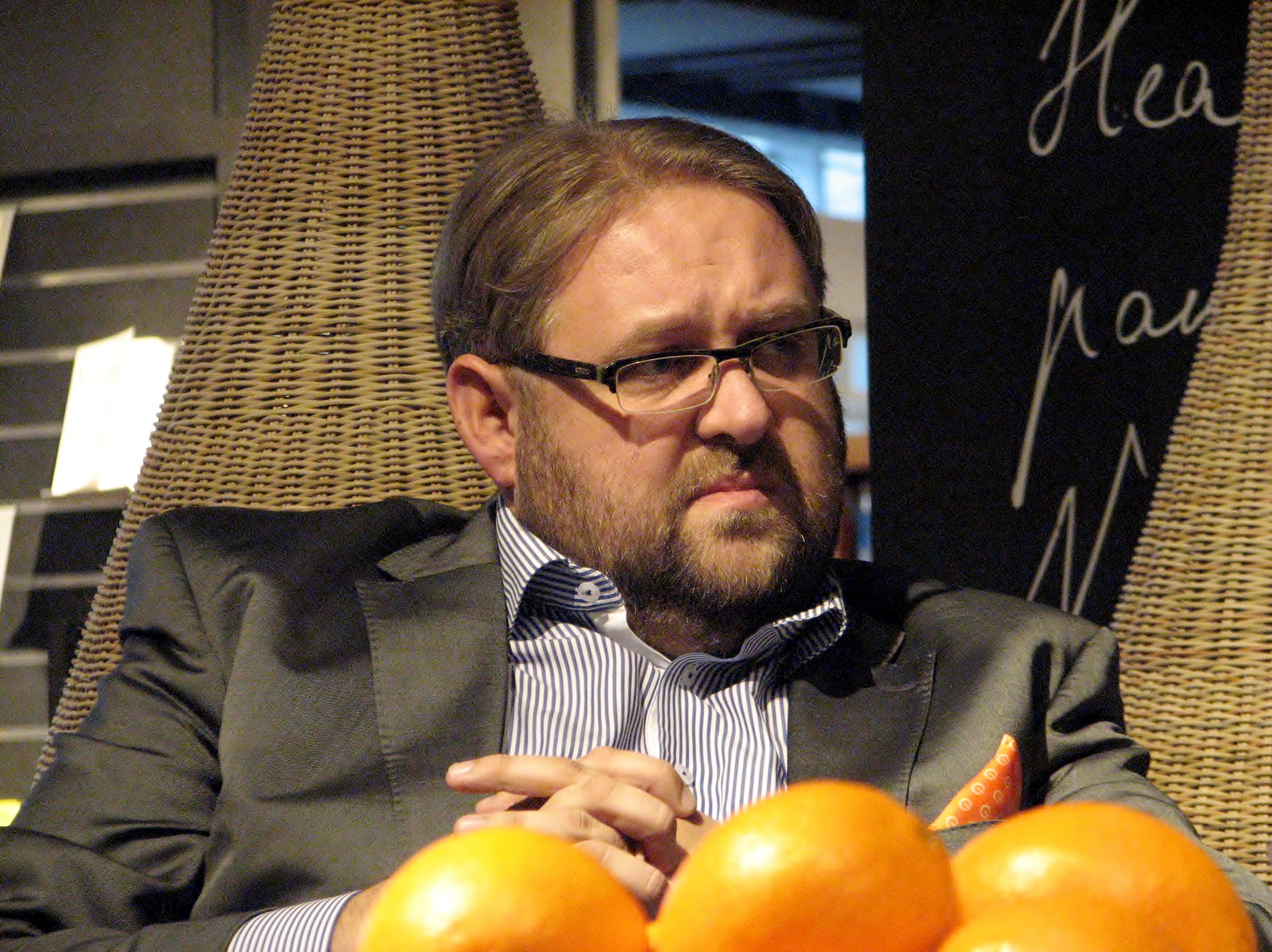 Anvar Samost avalikus vestlusringis Solarise keskuse Apollos